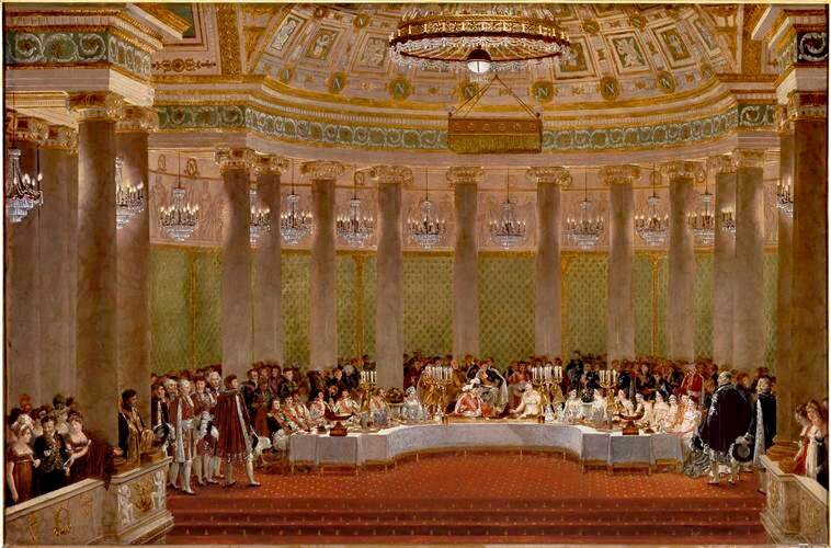 Festbankett anlässlich der Hochzeit von Napoleon Bonaparte mit Marie-Louise von Österreich am 2. April 1810Anmerkungen:musée national du château de Fontainebleau